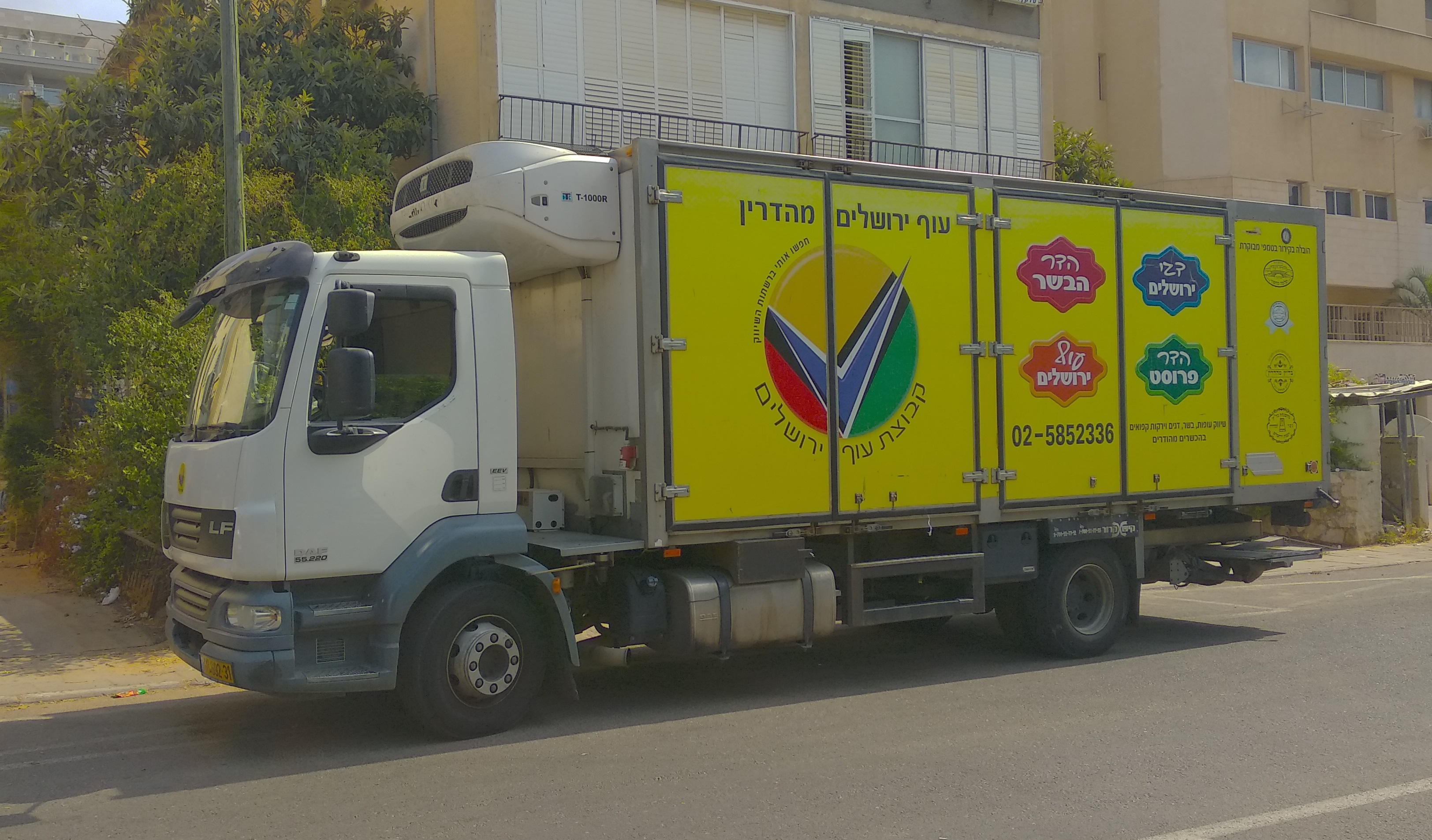 משאית חלוקה של "עוף ירושלים"